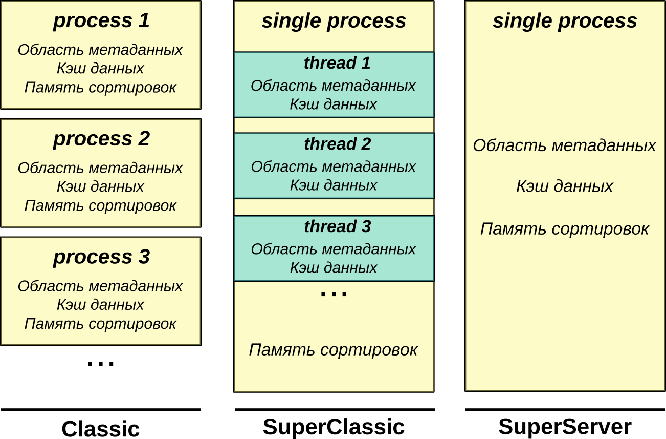 архитектуры Ред Базы Данных